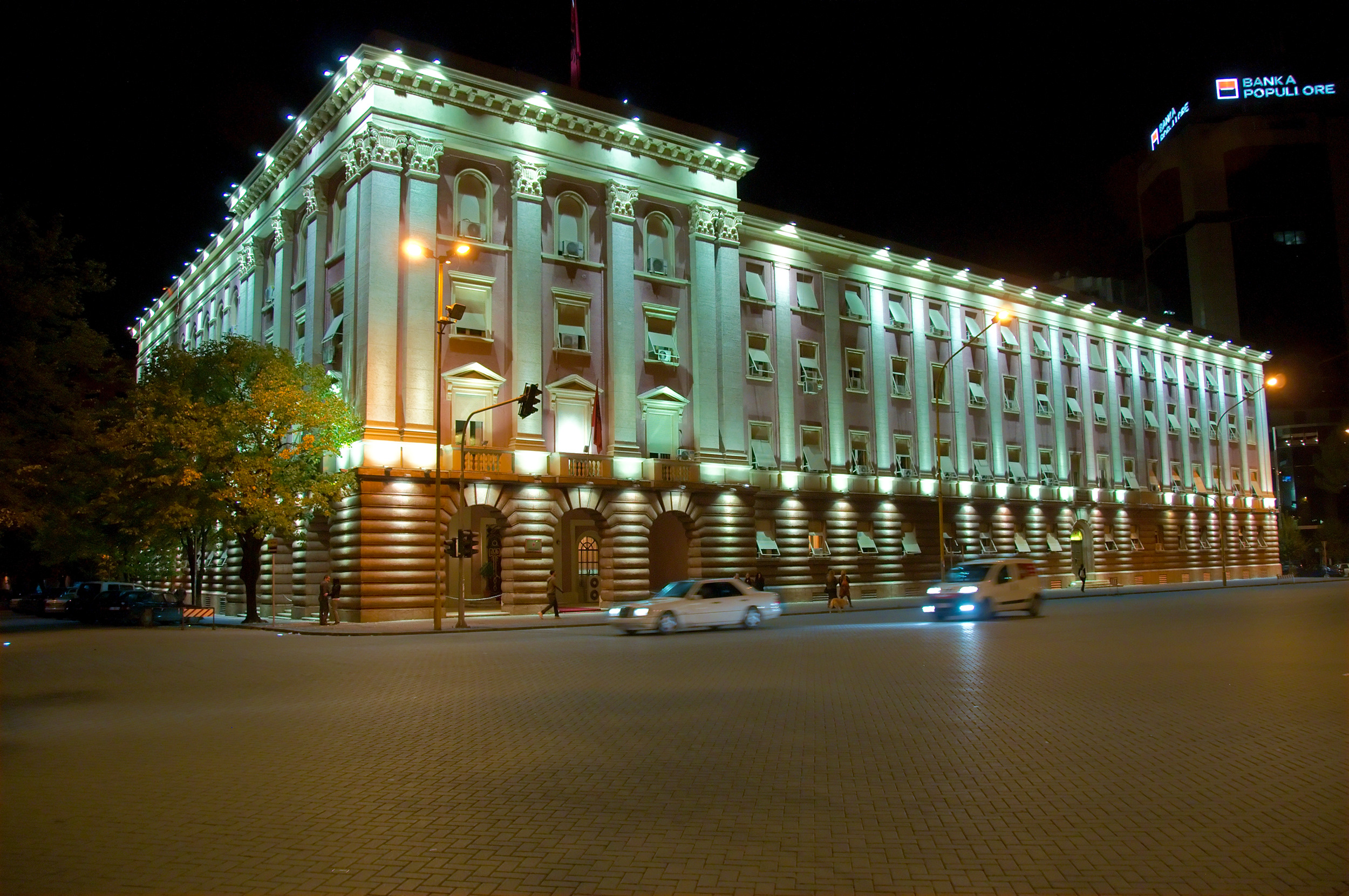 Budova parlamentu v Tiraně v roce 2009